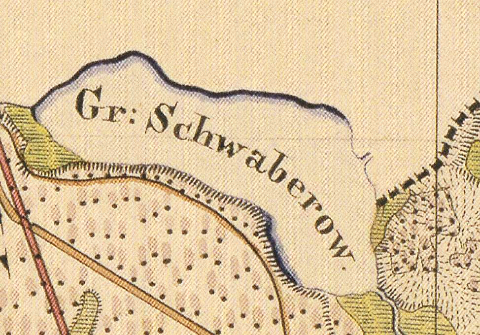 Großer Schwaberowsee, Stadt Fürstenberg/Havel, Lkr. Oberhavel, Brandenburg, Ausschnitt aus dem Urmesstischblatt Blatt 2744 Wesenberg von 1825